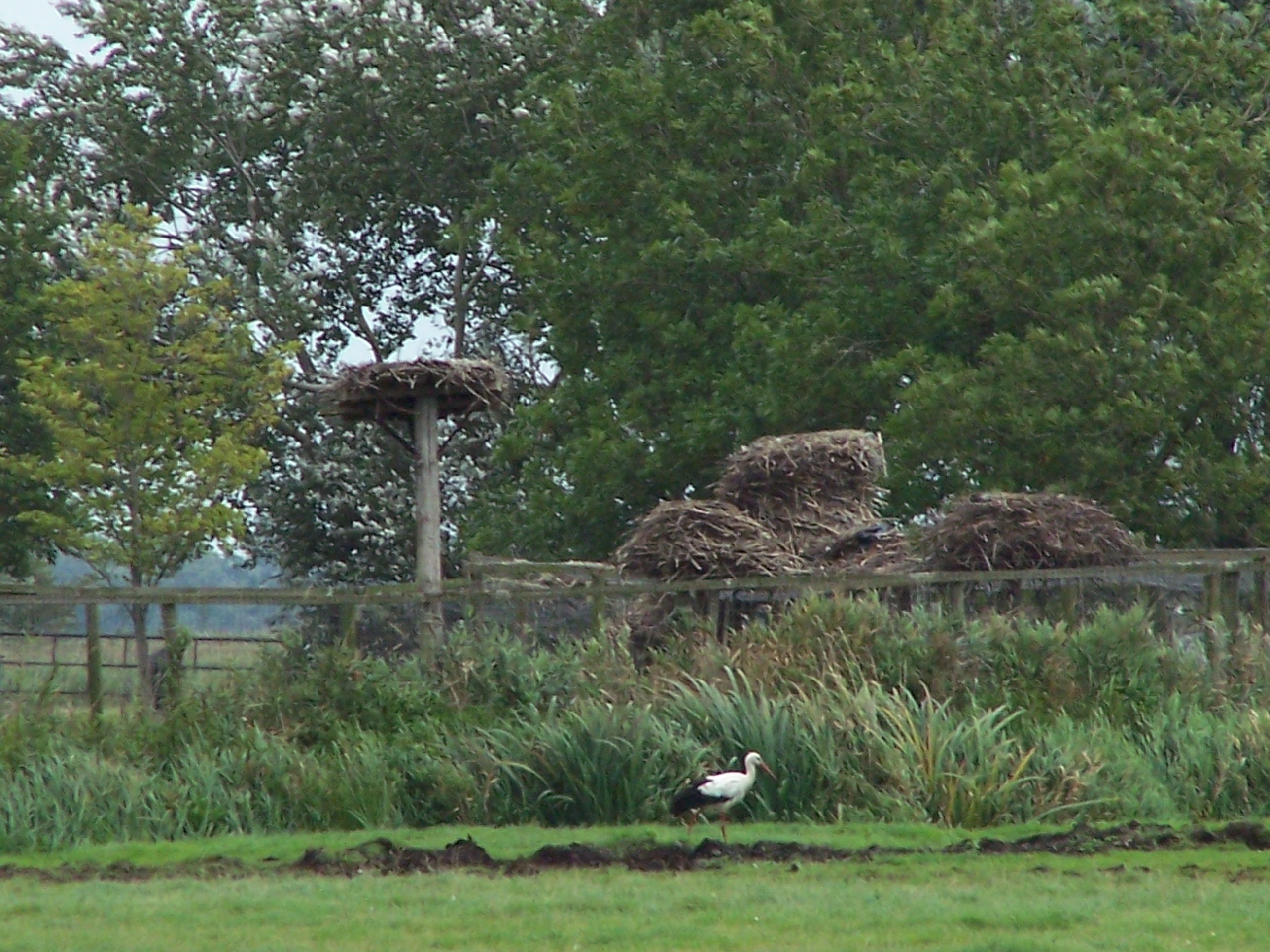 It earrebarredoarp by Eagmaryp.